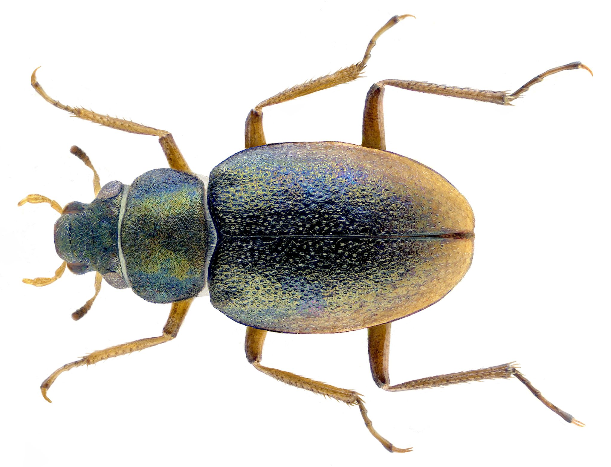 Familie: Hydraenidae Grösse: 2,28 mm Fundort: Südafrika, Cape Town leg. A.Skale, 2001; det. M.Jäch Foto: U.Schmidt, 2007